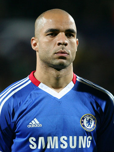 Piłkarz Chelsea Londyn - Alex